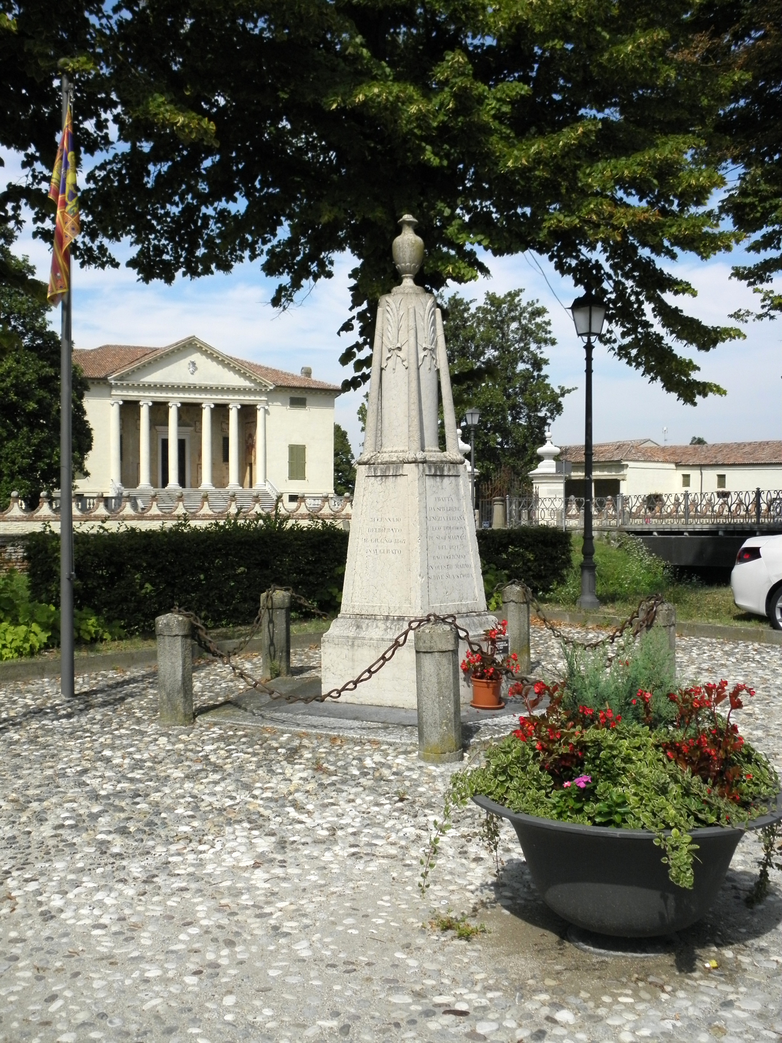 Fratta Polesine: Colonna dei Martiri, il monumento commemorativo dedicato ai Carbonari della Fratta sito nei pressi del ponte sullo Scortico, sul lato opposto a Villa Badoer, opera di Grazioso Spazzi (1867).